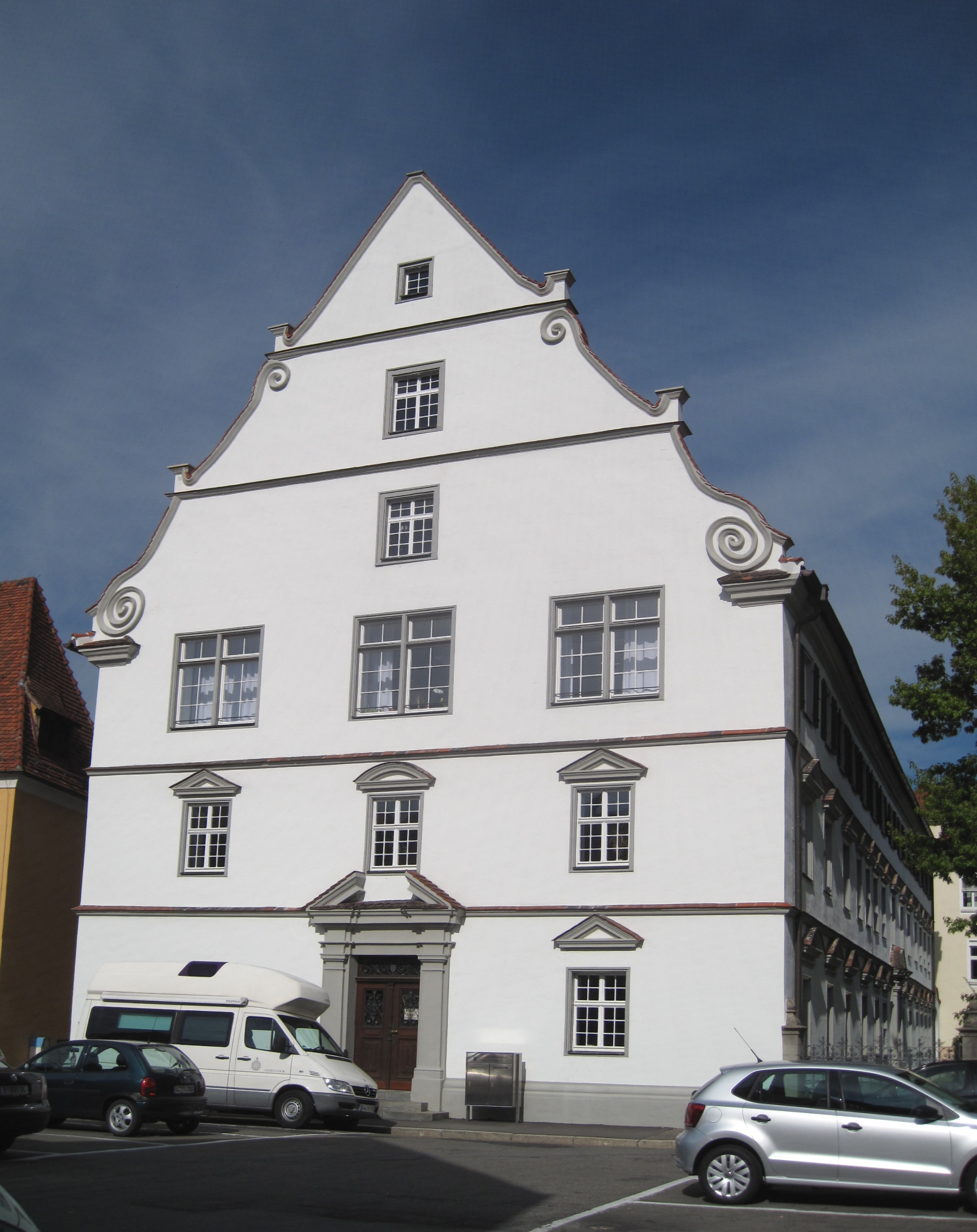 Amtsgericht Biberach an der Riß, Alter Postplatz 4 in Biberach an der Riß.